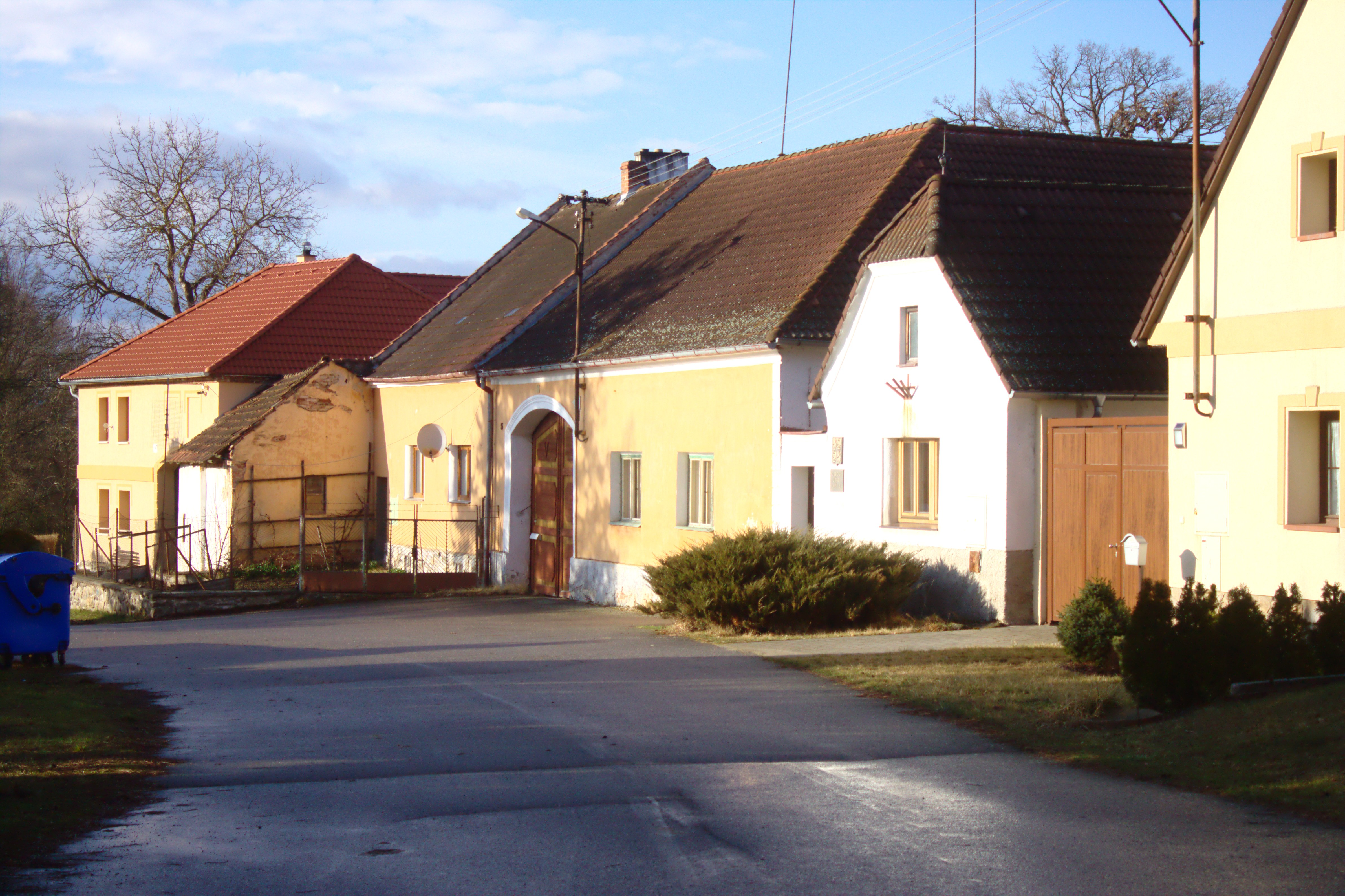 Domy ve vesnici Lužice Project: Fotíme Česko